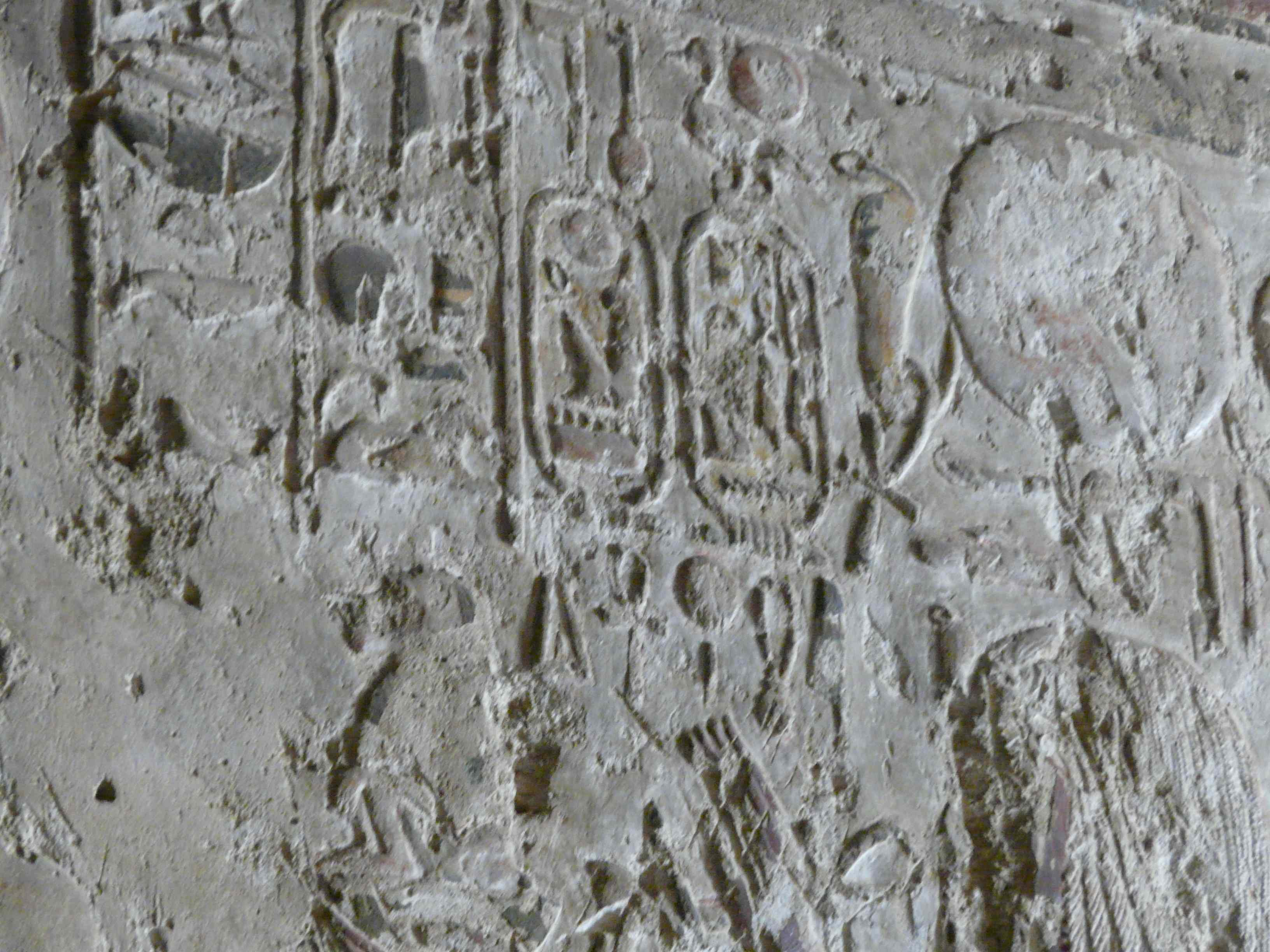 Intérieur du Spéos Artemidos, titulature de la reine Séthi Ier